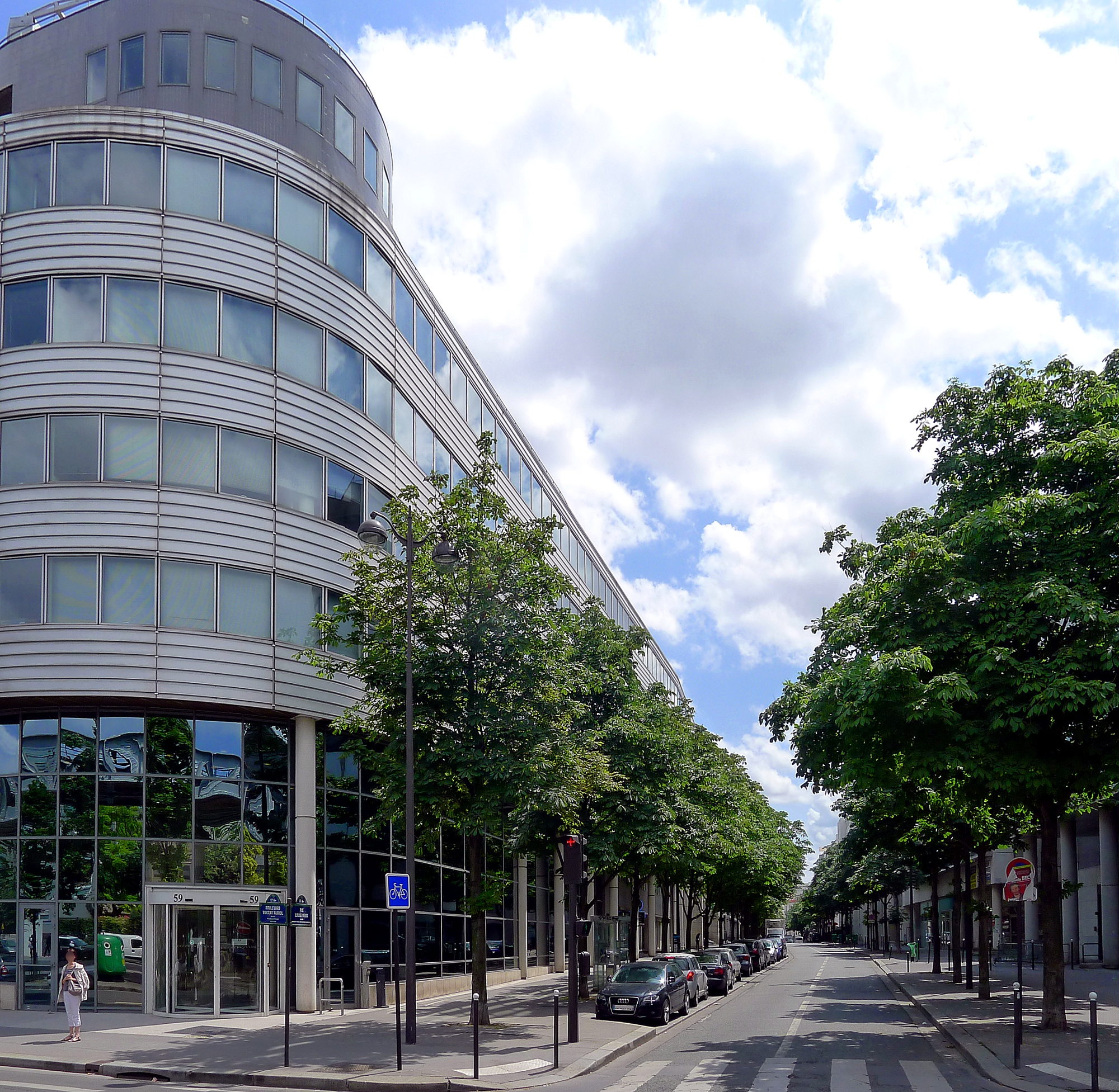 Rue Louise-Weiss - Paris XIII